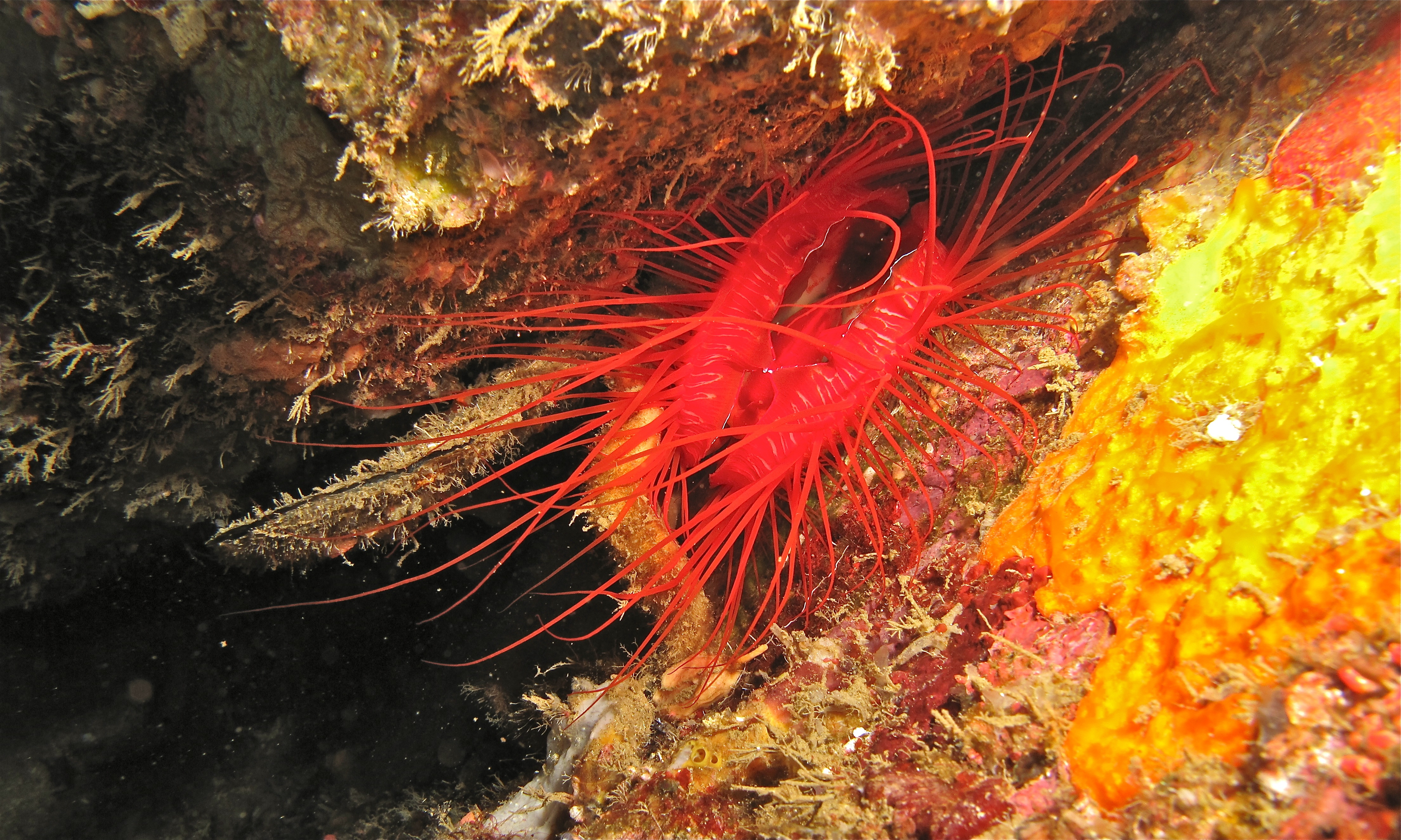 Nudi Retreat I, Lembeh Strait, Sulawesi, INDONESIA